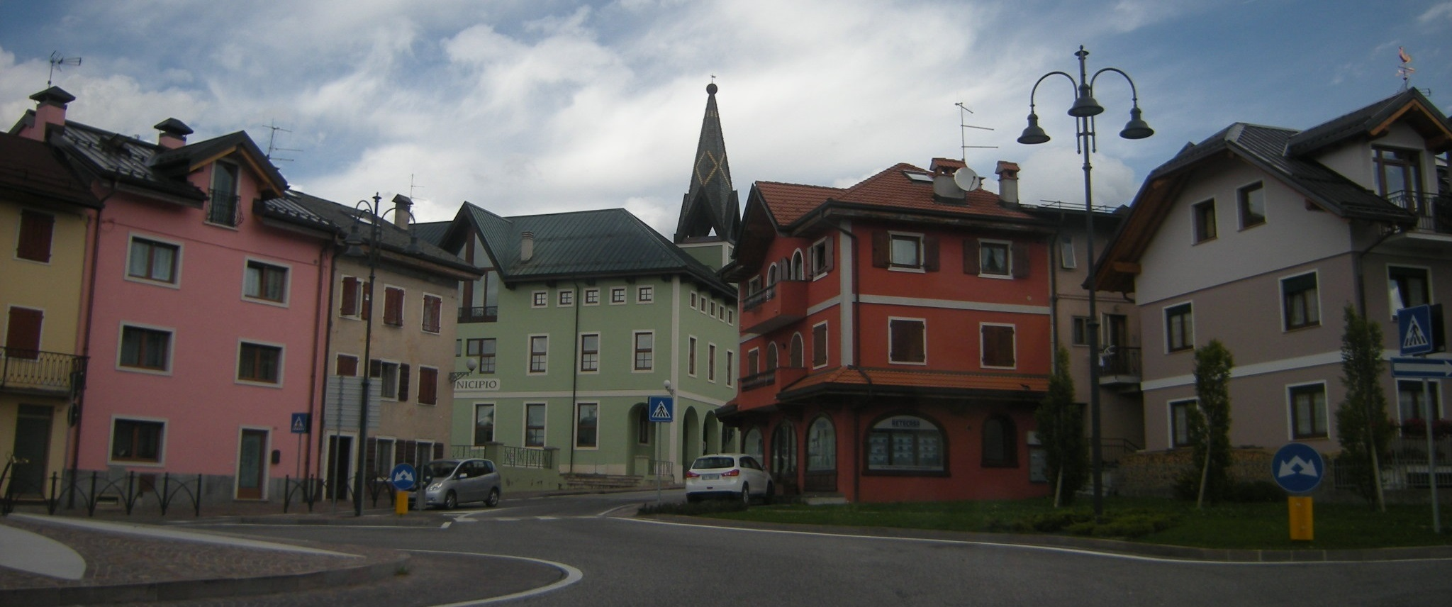 Edifici di Canove